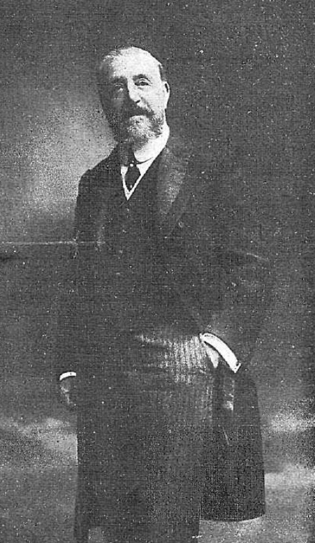 "Sr. Conde de Esteban Collantes", en la revista Summa.